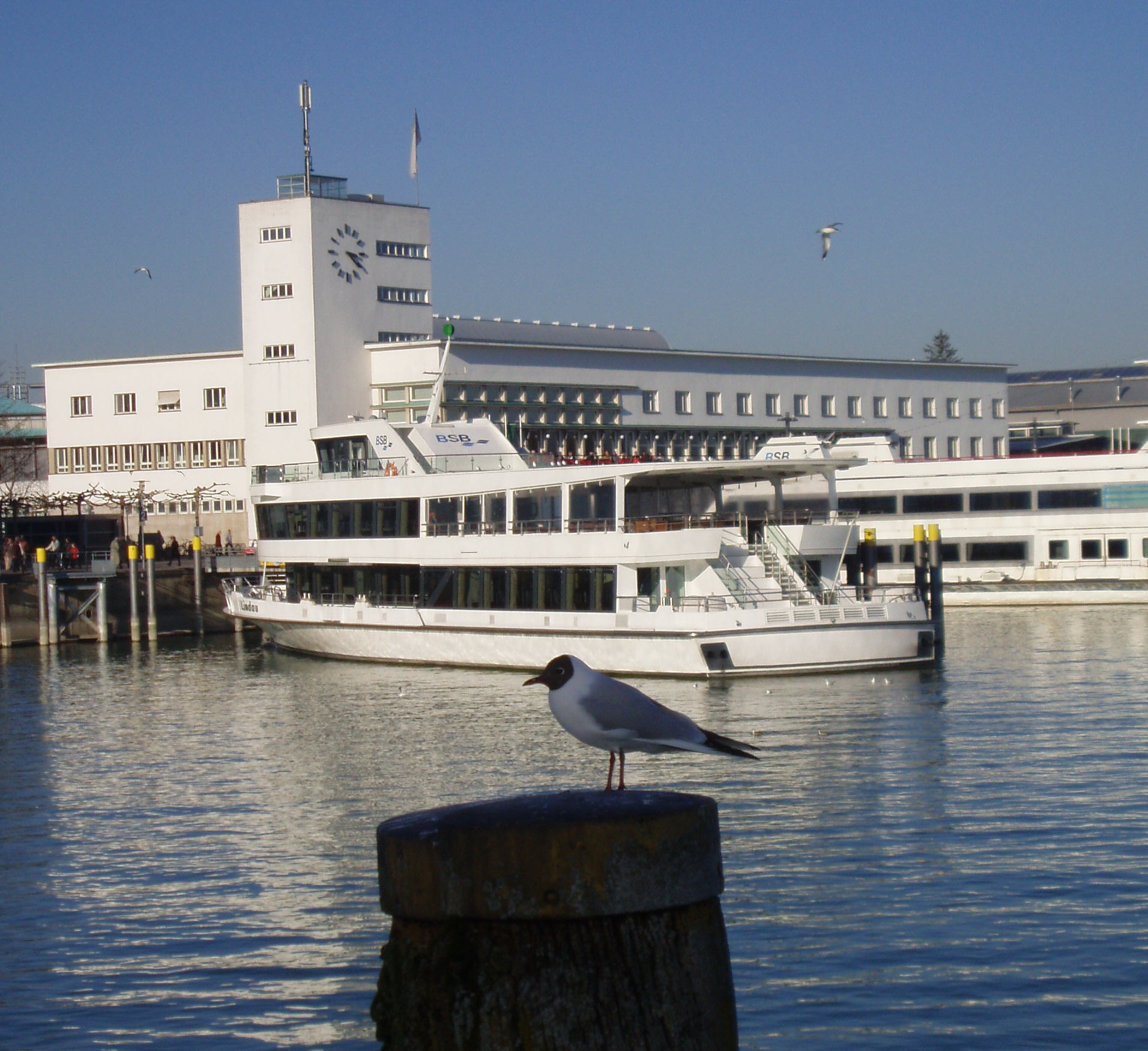 MS Lindau, Alter Hafenbahnhof Friedrichshafen, Bodensee